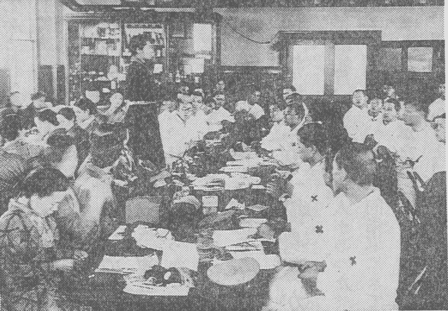 Kokonoe Toshiko (Japanese, *1904, †2002)